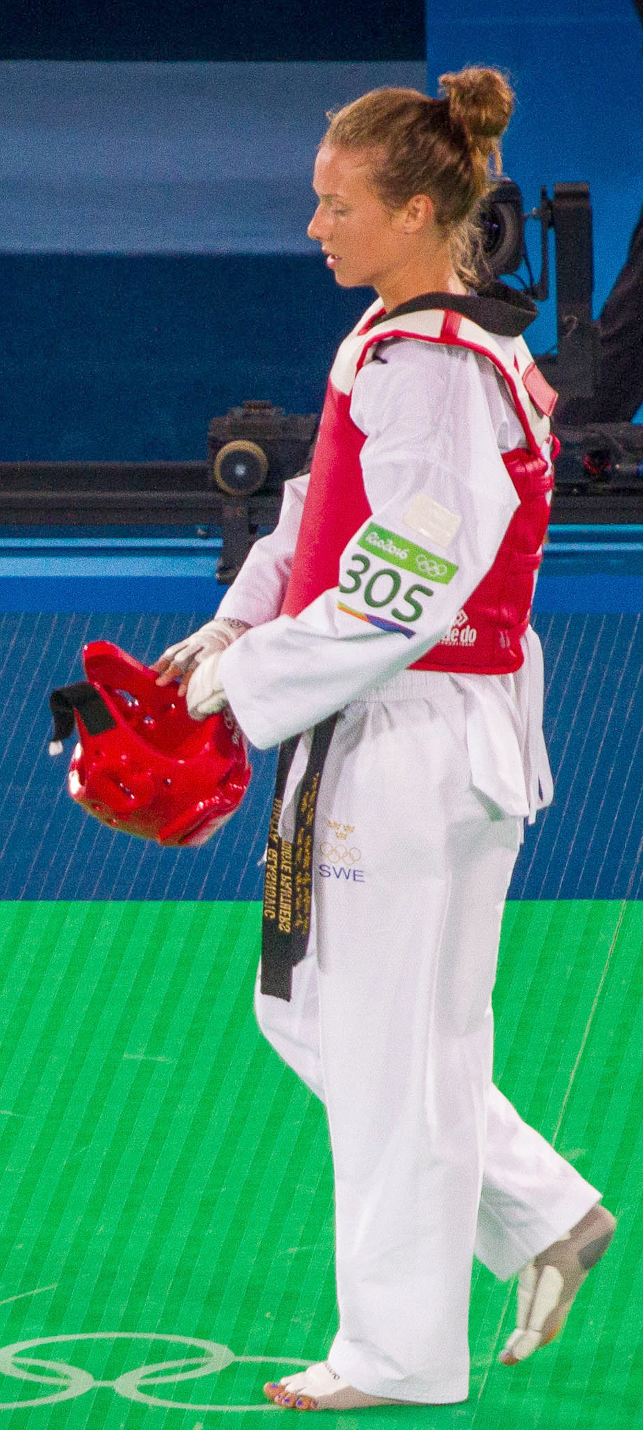 Rio 2016